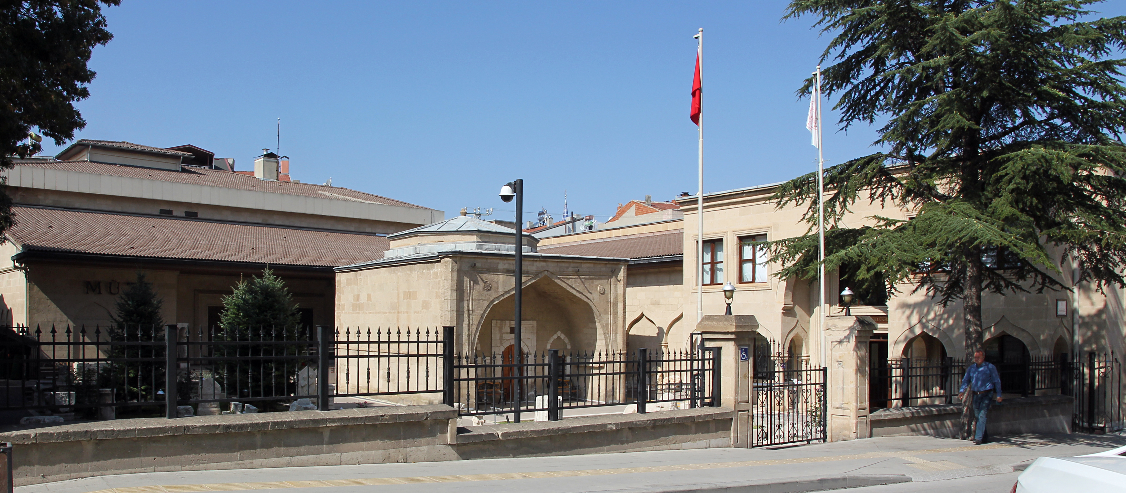 Archäologisches Museum Burdur, Südwesttürkei